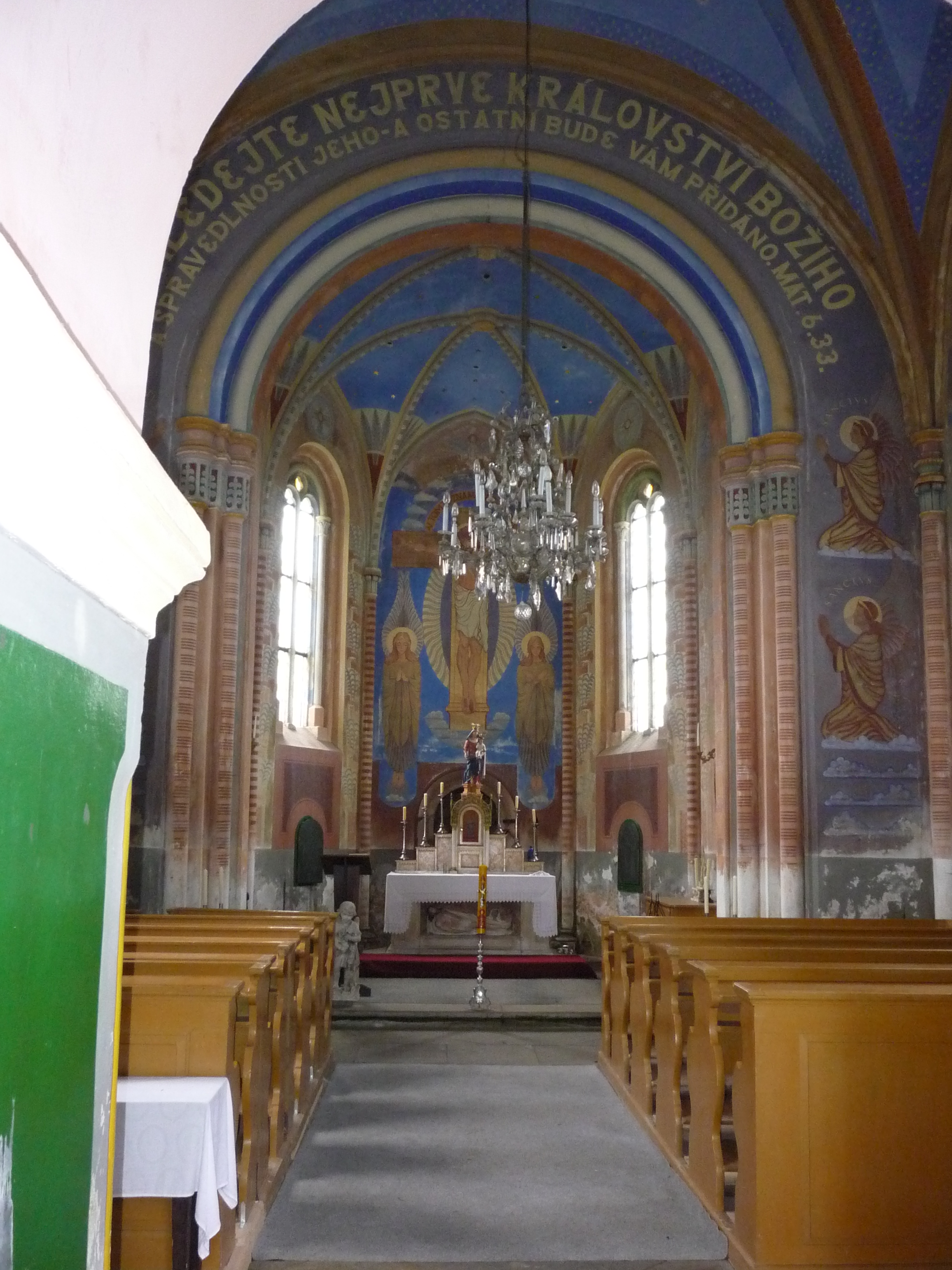 Autor fotografie Jiří Zelenka. Interier kaple Povýšení svatého Kříže. Vnitřní část kaple od hlavního vchodu. Město Chotěboř. Okr. Havlíčkův Brod. Kraj Vysočina. Czech Republik.